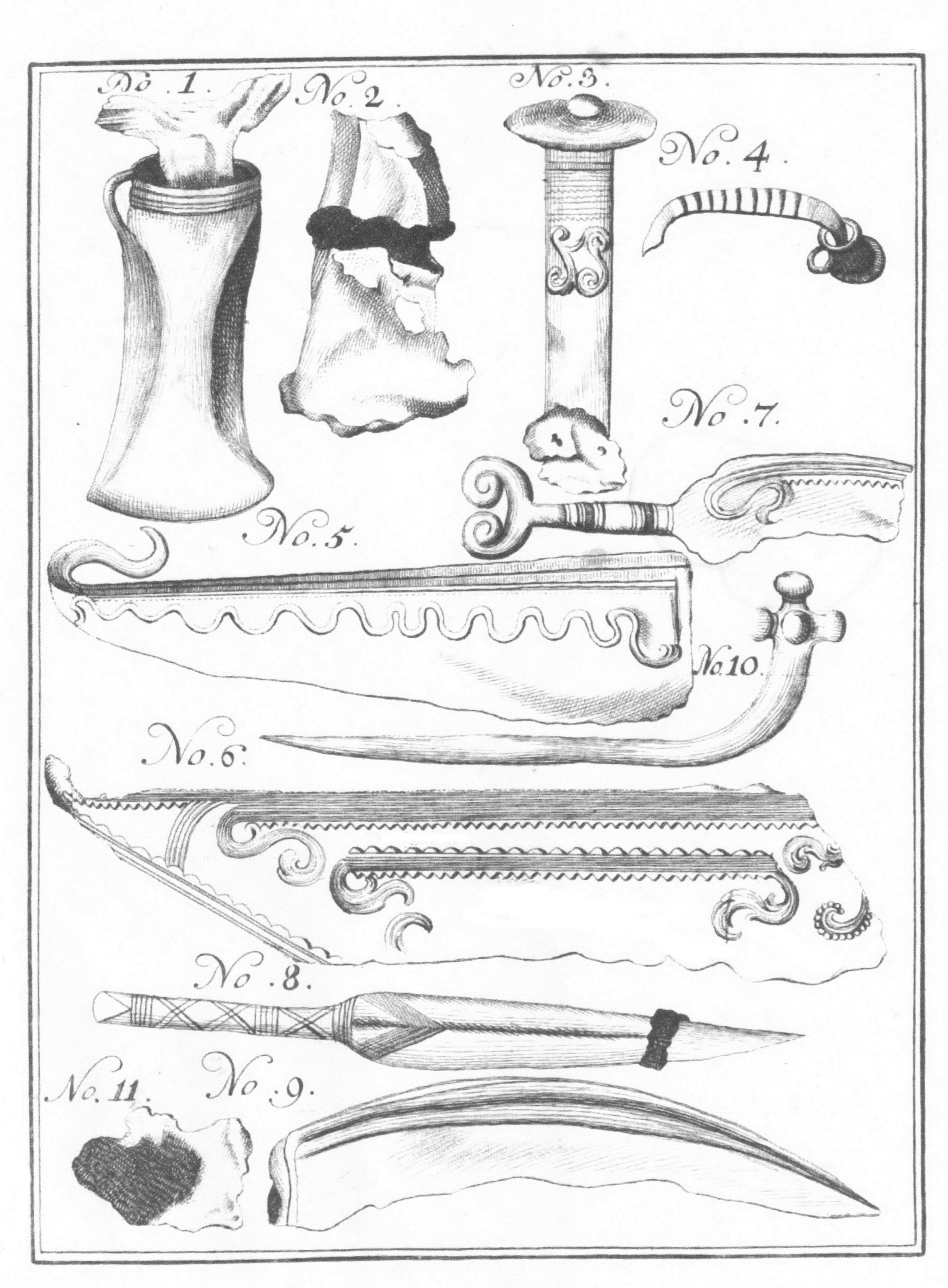 Zeichnung von Fundstücken von der Insel Sylt, Johann Friedrich Camerer um 1756 No 1: Vermutlich ein Streithammer, gefunden 1752 auf der Insel Sylt, 4 Zoll lang. Der Diameter der Höhlung ist ein Zoll. Die zierliche äußerliche Ausschweifung lauft bis auf einen halben Zoll zusammen, und seine unterste Breite ist gut anderthalb Zoll No 2:Streithammer, 3 Zoll lang, in der Mitte mit Pech zusammengehalten, Beite in der Mitte 1.5 Zoll No 3: Keine Zuordnung, Länge etwa 1/2 Zoll No 4: Keine Zuordnung, Länge etwa 2 Zoll No 5: Keine Zuordnung, Länge etwa 2 1/4 Zoll No 6: Eventuell Säge bzw. Etwas zum Haare schneiden, Kamm? Länge etwa 4 Zoll, Breite 1 Zoll No 7: Vermutlich ein Messer No 8: cutellus anfarus?, Länge 3 1/2 Zoll No 9: Stück von einer Art Messer, Länge etwa 3 Zoll No 10:Vermutlich eine Haarnadel, Länge 2 1/2 Zoll No 11: Ein Knochen mit Kupfereinschmelzung, Länge 1 Zoll